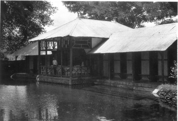 Foto. Badplaats Tjimangli in de buurt van Wonosobo op Midden Java